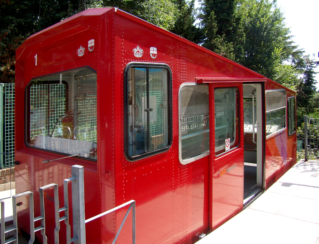 La vettura della funicolare di Sant'Anna a Genova, ripresa nella stazione superiore.